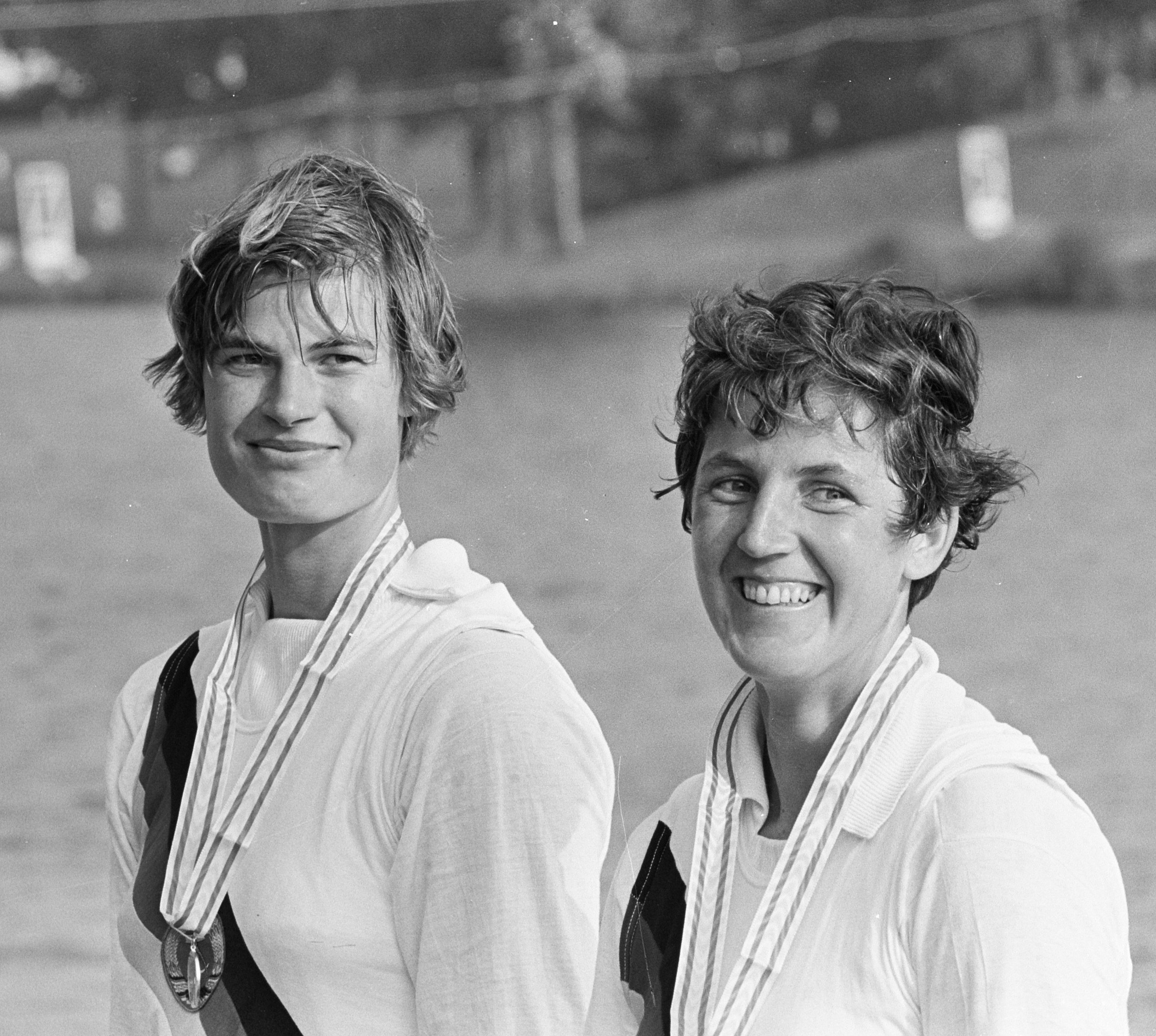 Europese Roeikampioenschappen dames 1966, Oost-Duitse dubbel-twee